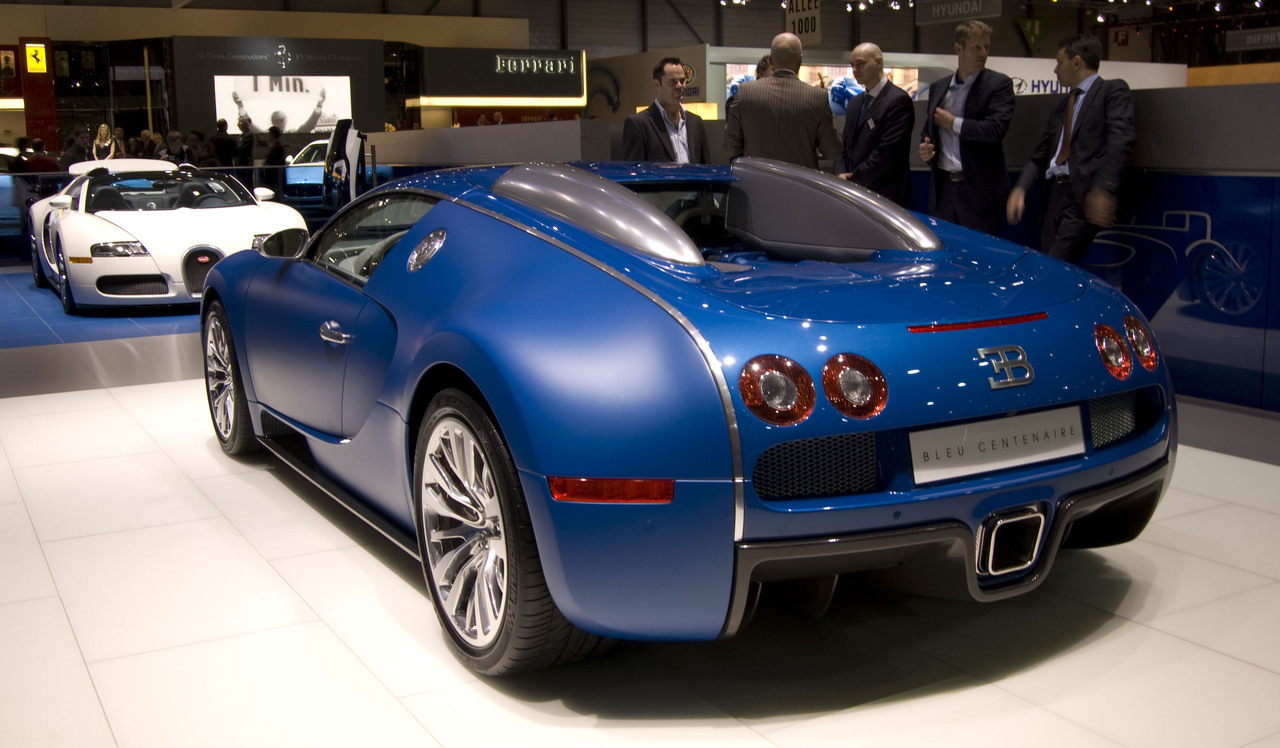 Bugatti Veyron Bleu Centenaire en el Salón de Ginebra 2009.